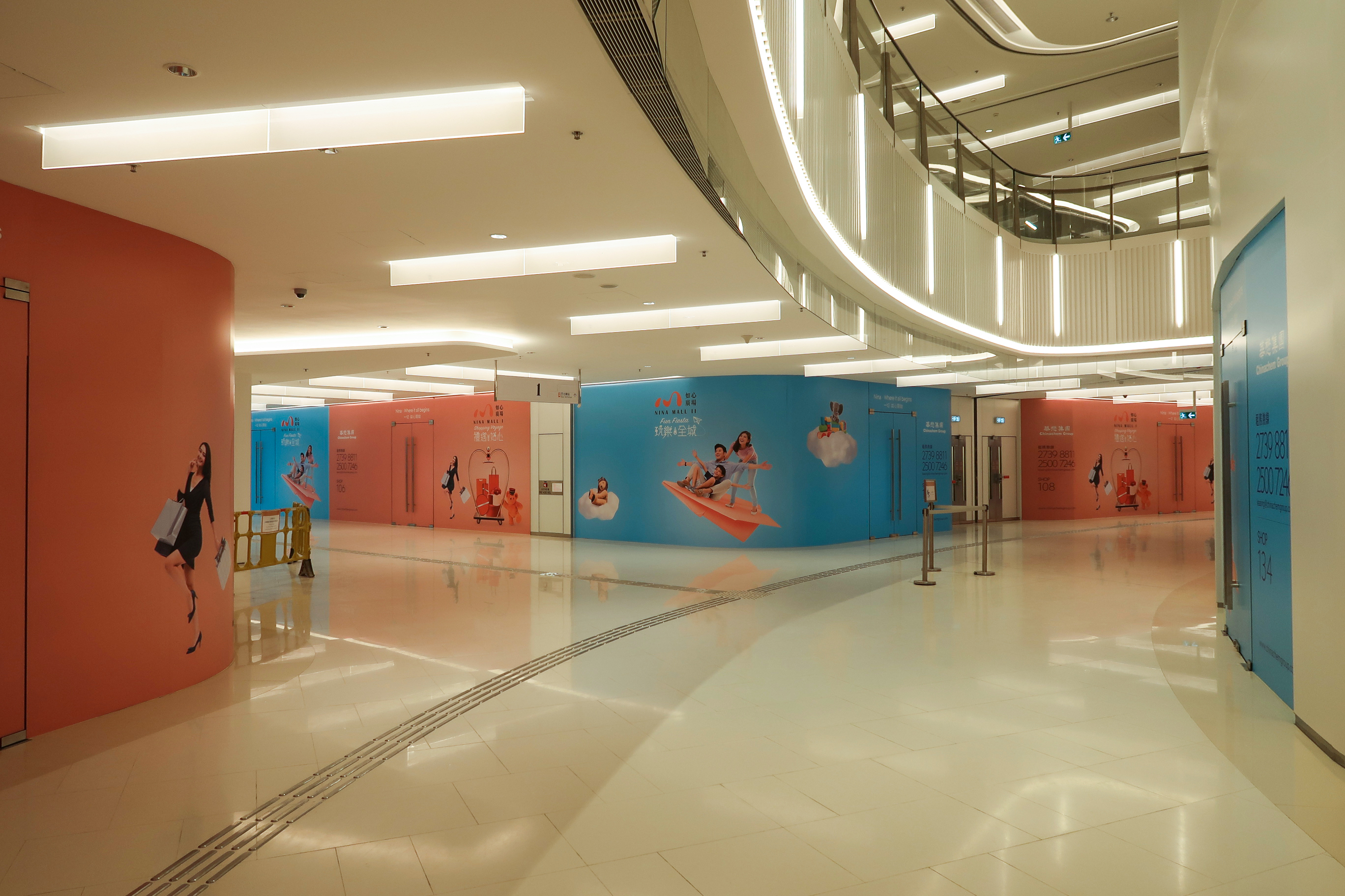 Nina Mall II Level 1